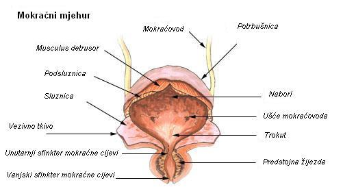 Anatomija mokraćnog mjehura